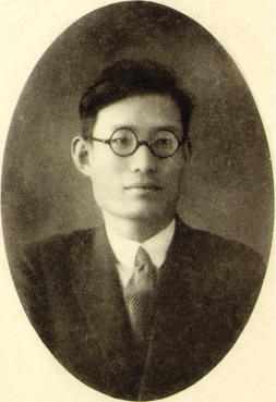 Yun Il-seon, Korean Medicalist